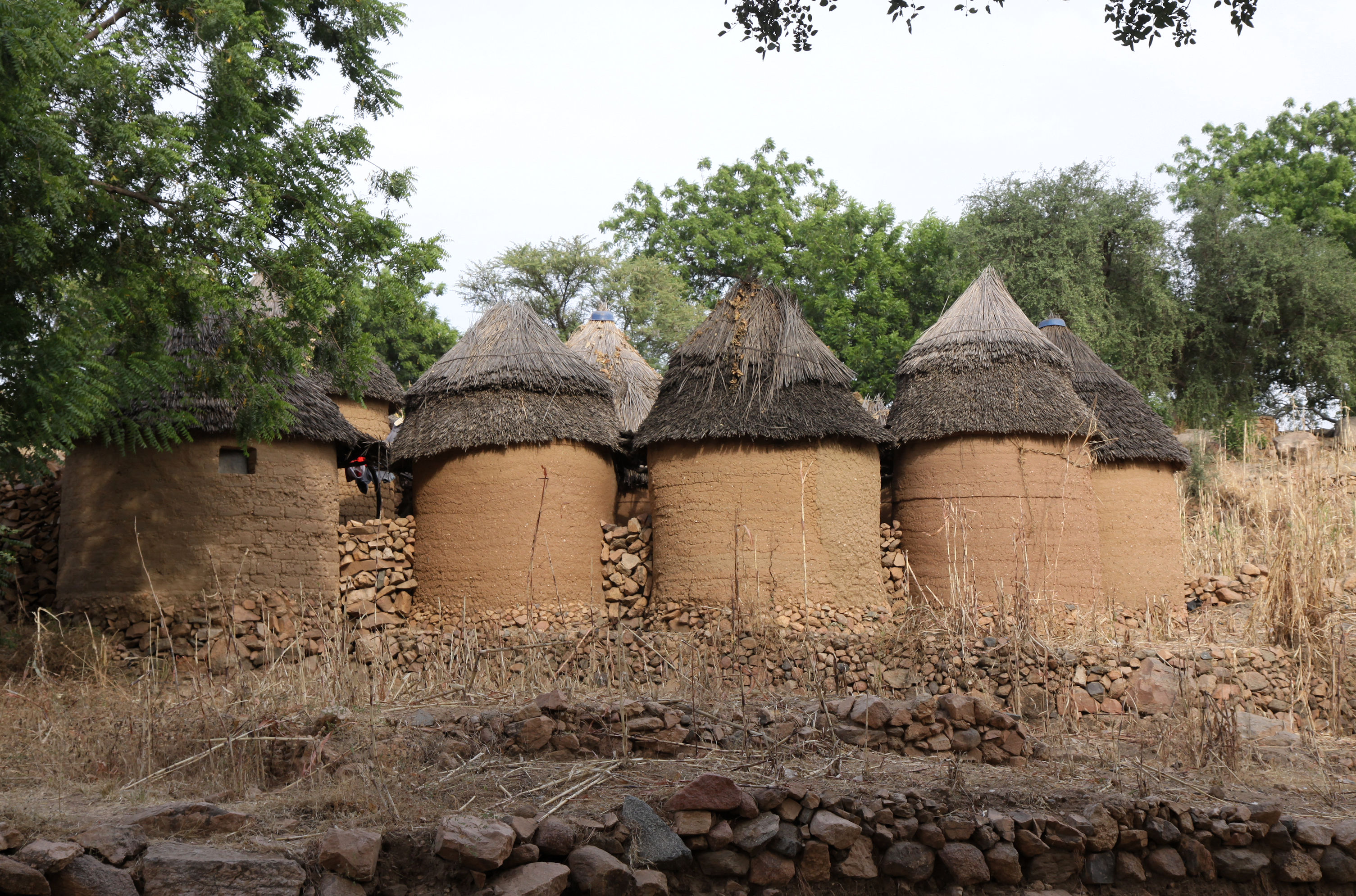 Village podoko de la chefferie d'Oudjilla, au pied des monts Mandara